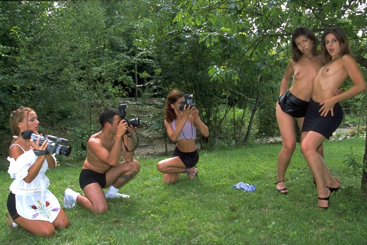 Photo de tournage du film "French Beauty", de John B. Root